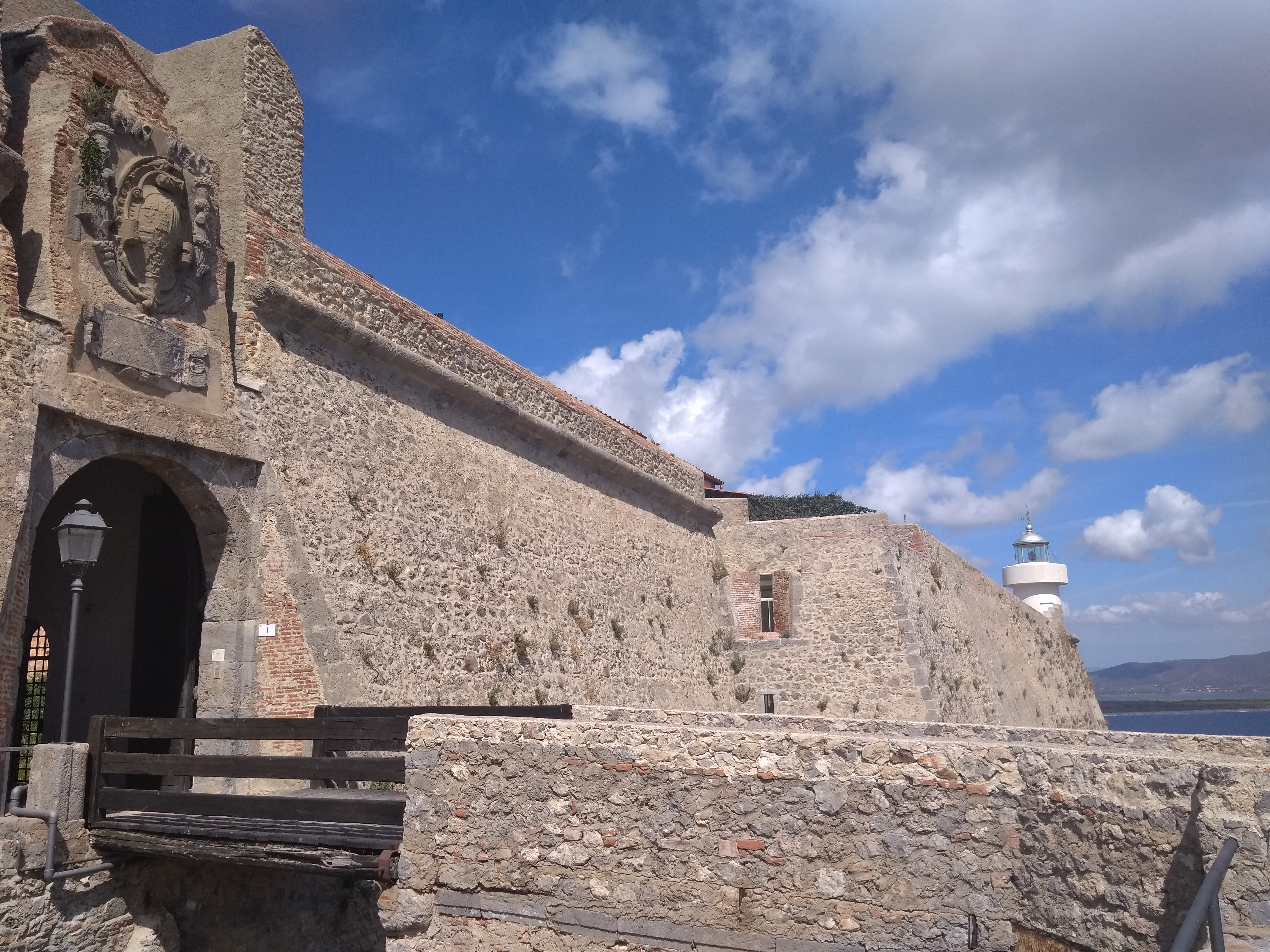 Rocca aldobrandesca, Porto Ercole, Grosseto, Tuscany, Italy